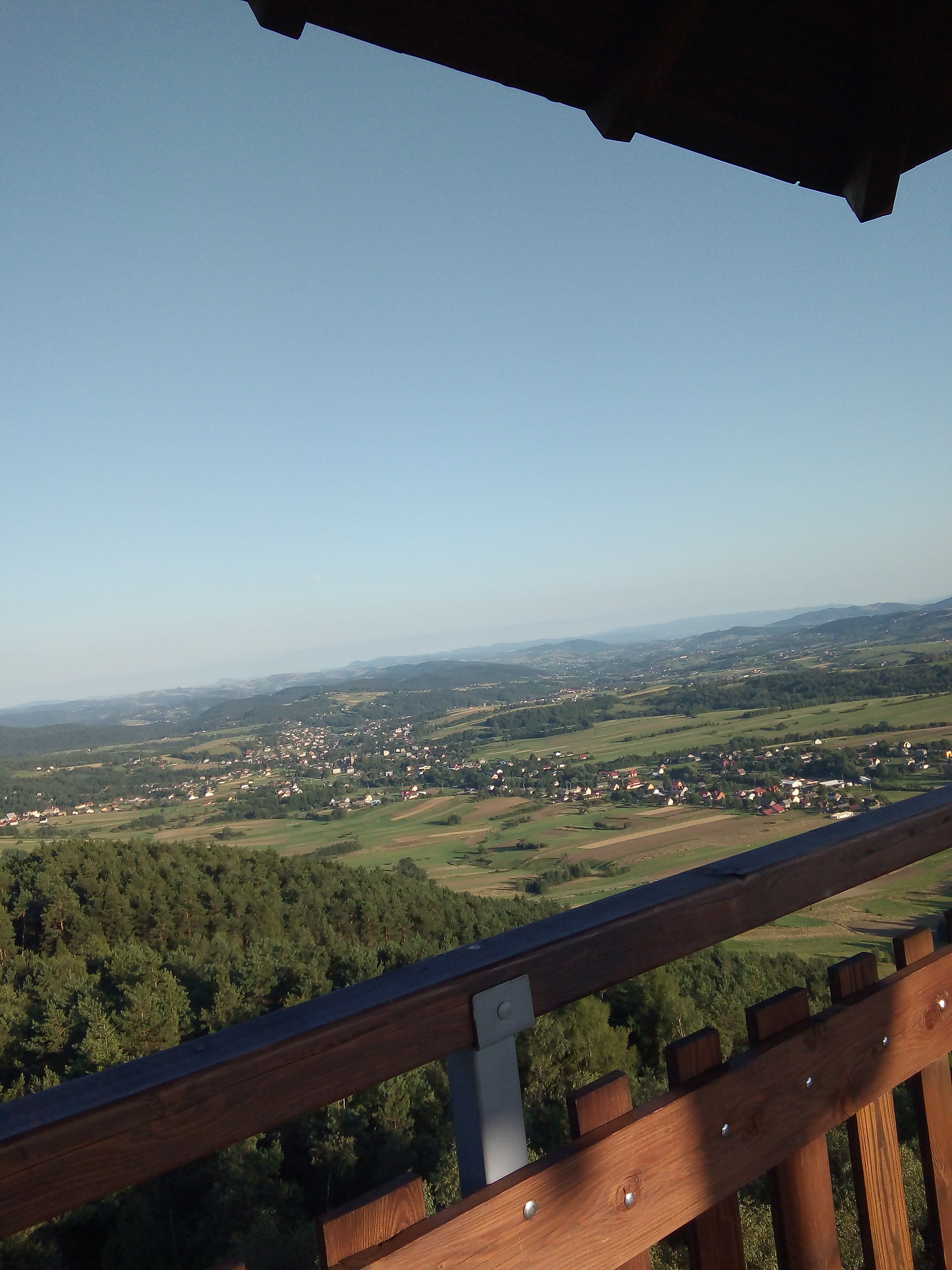 Widok na Iwkową z wieży widokowej na szczycie Szpilówki